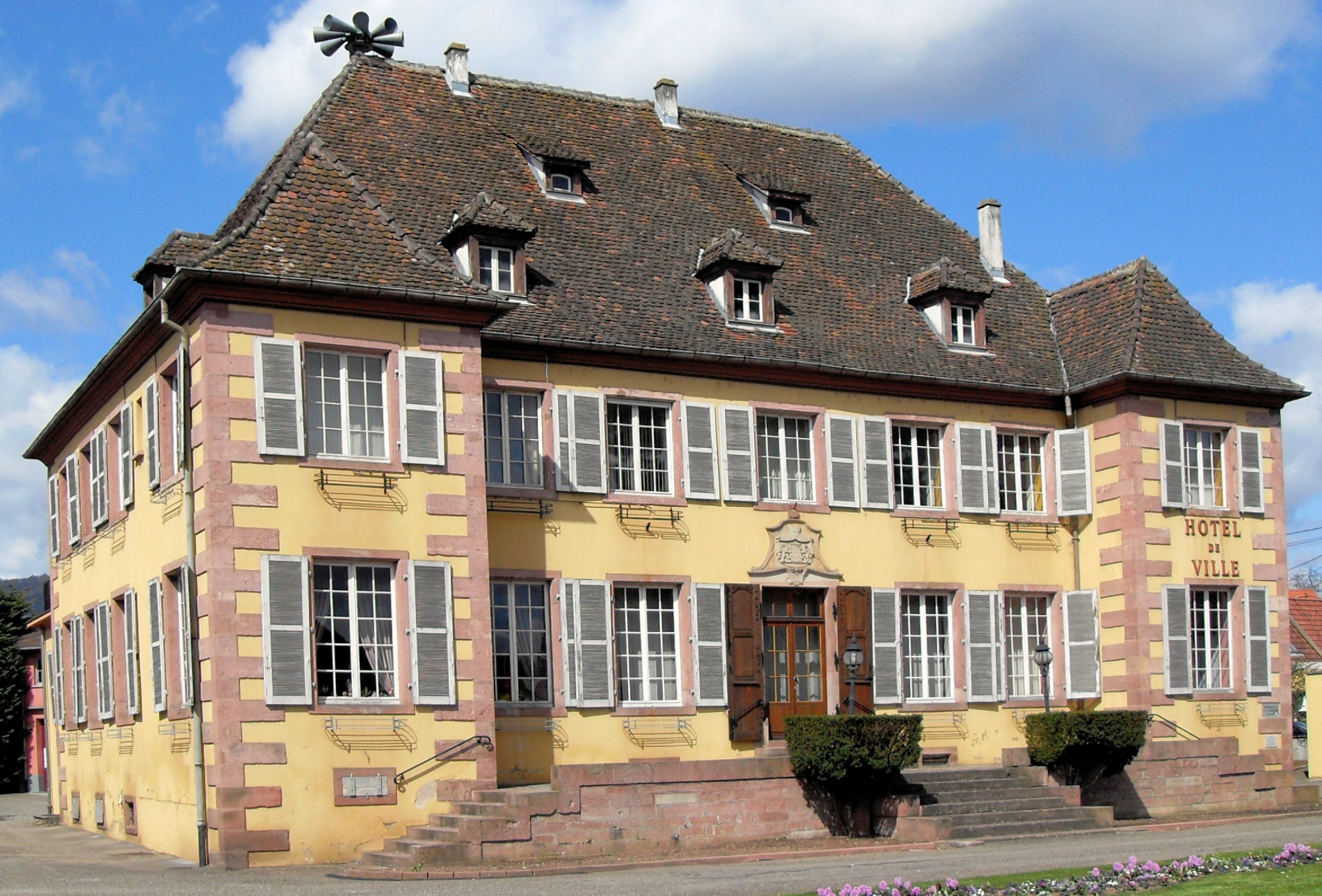 L'hôtel de ville d'Ingersheim